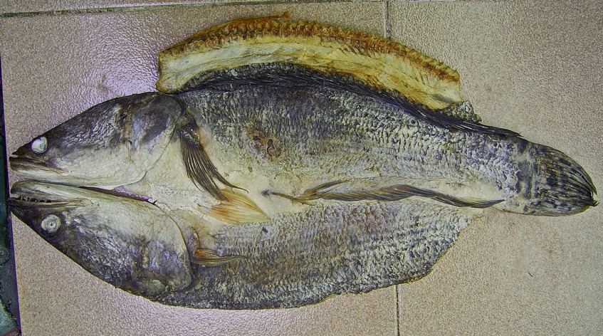 Salted toman, Channa micropeltes. Putussibau, West Kalimantan, Indonesia.